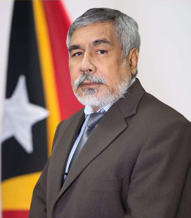 Gilman Exposto dos Santos, Abgeordneter des Nationalparlaments Osttimors